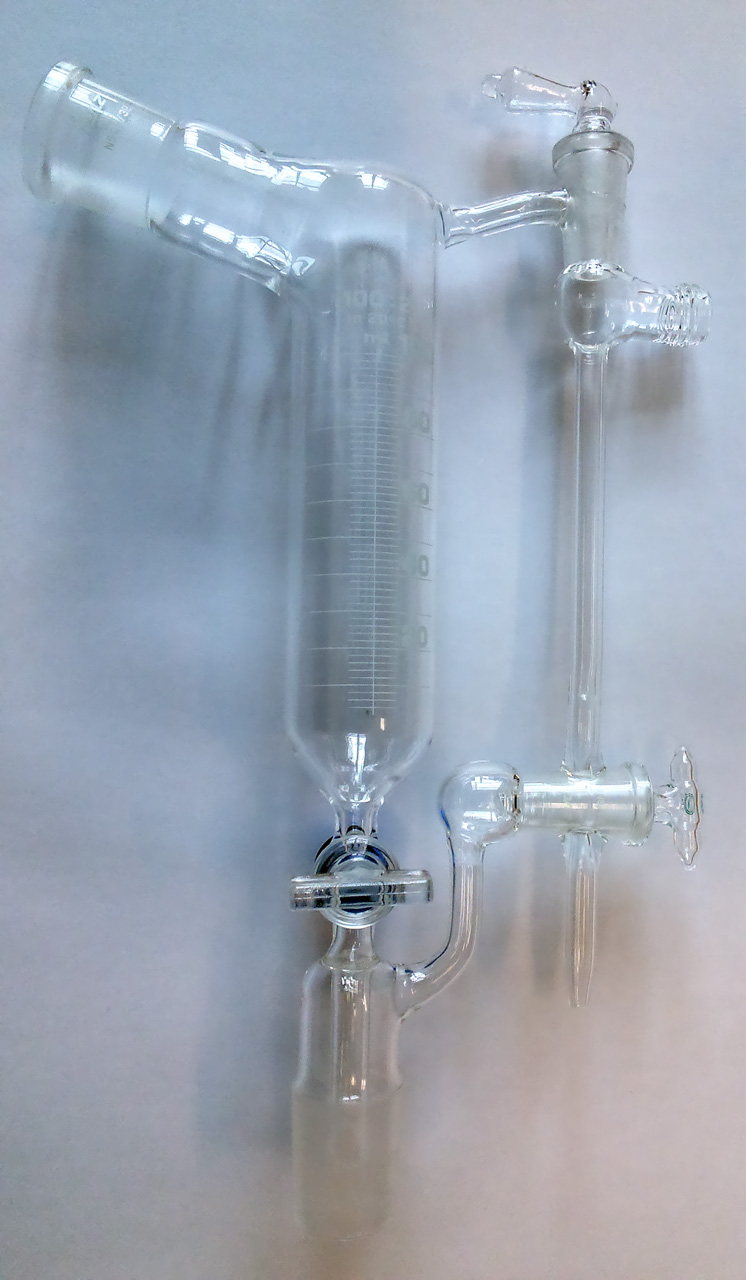 Destillationsvorstoß nach Anschütz-Thiele mit NS 29/32-Anschlüssen für Kühler (oben links) und Vorlagekolben (unten).